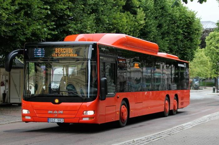 Karlstadsbuss